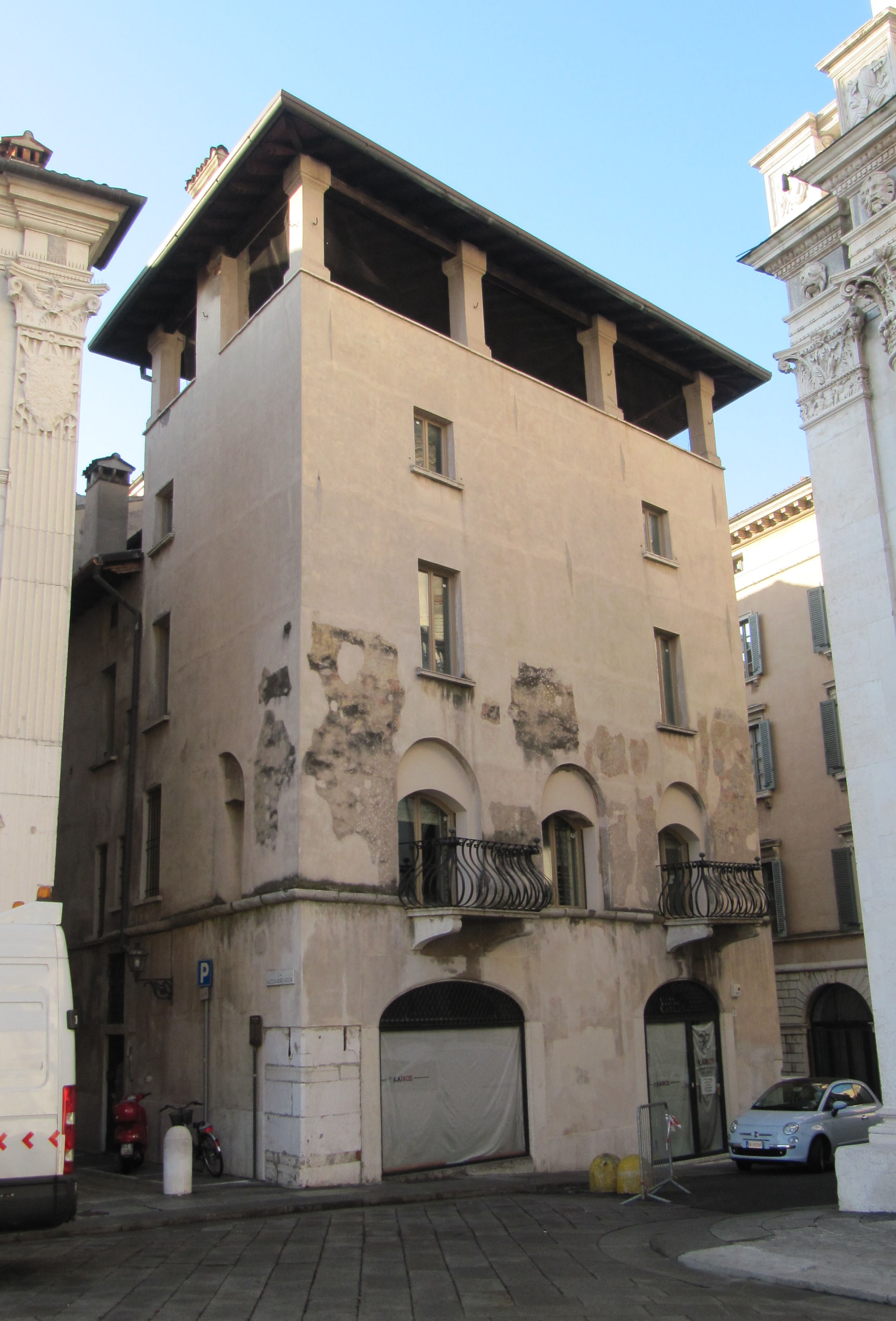 Casa Vender (XV secolo, Piazza della Loggia, Brescia)